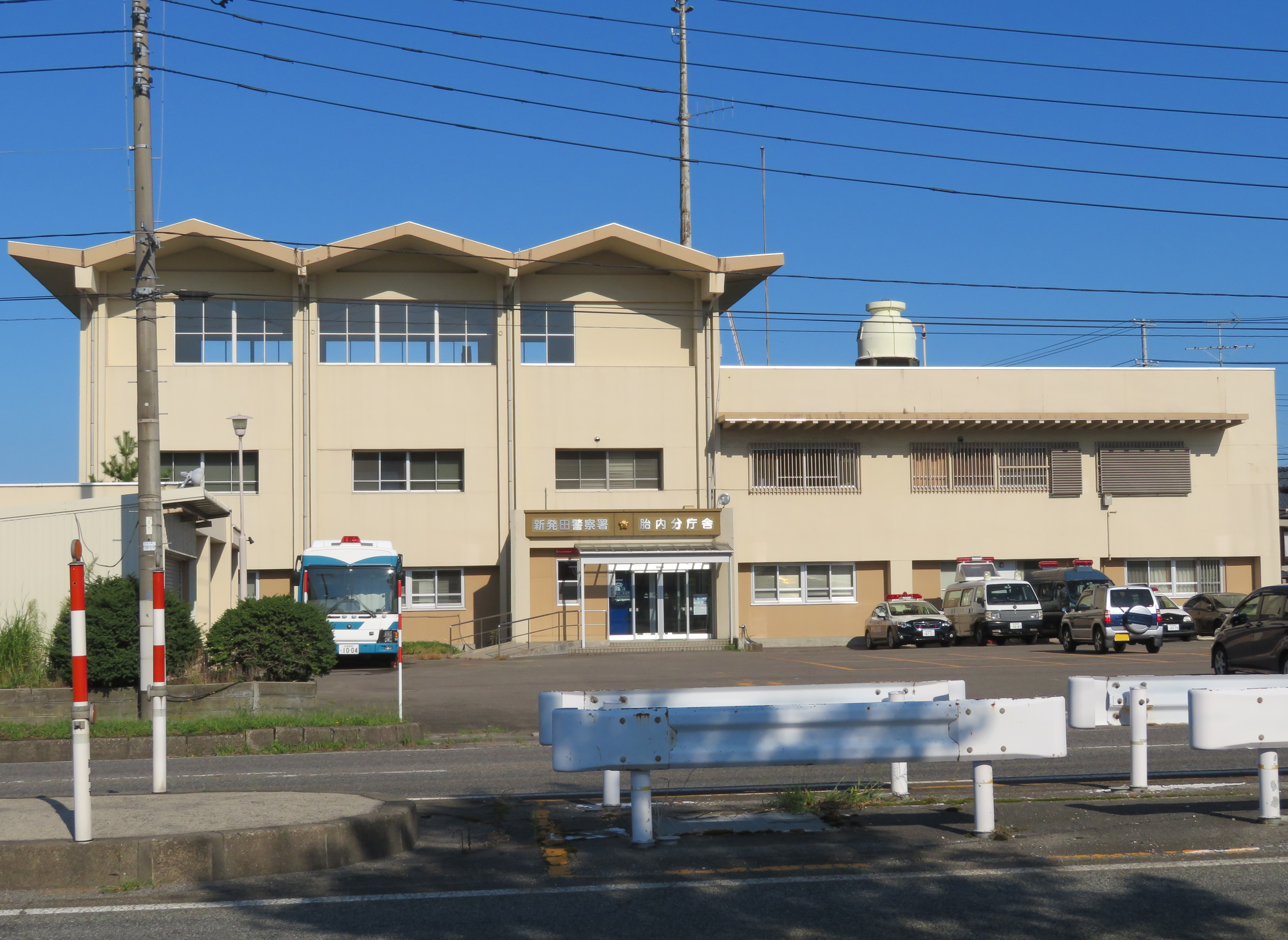 新潟県胎内市に所在する新発田警察署胎内分庁舎（旧胎内警察署） Canon PowerShot SX720 HS